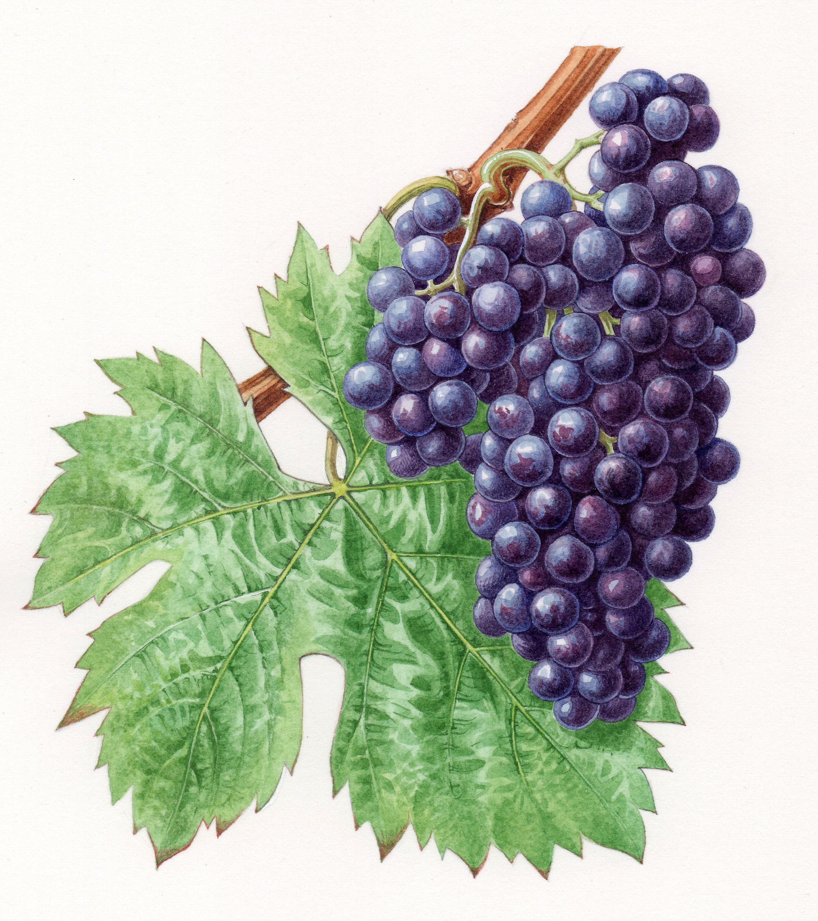 Aquarelle originale pour les Cépages de France (2001)